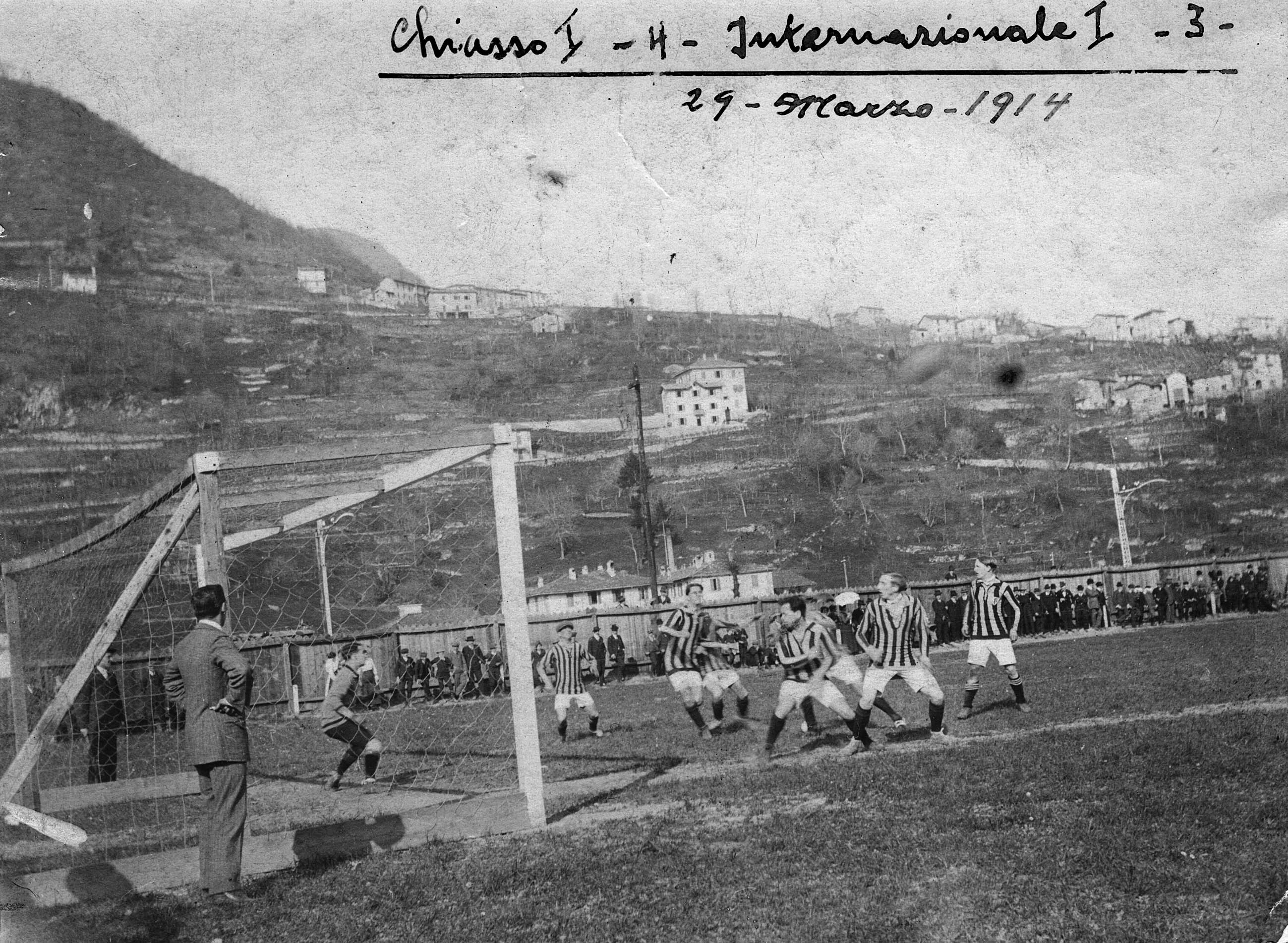 Il campo del Mornello a Maslianico fu la sede degli incontri del FC Chiasso durante l'appartenenza del sodalizio rossoblù alla federazione italiana.